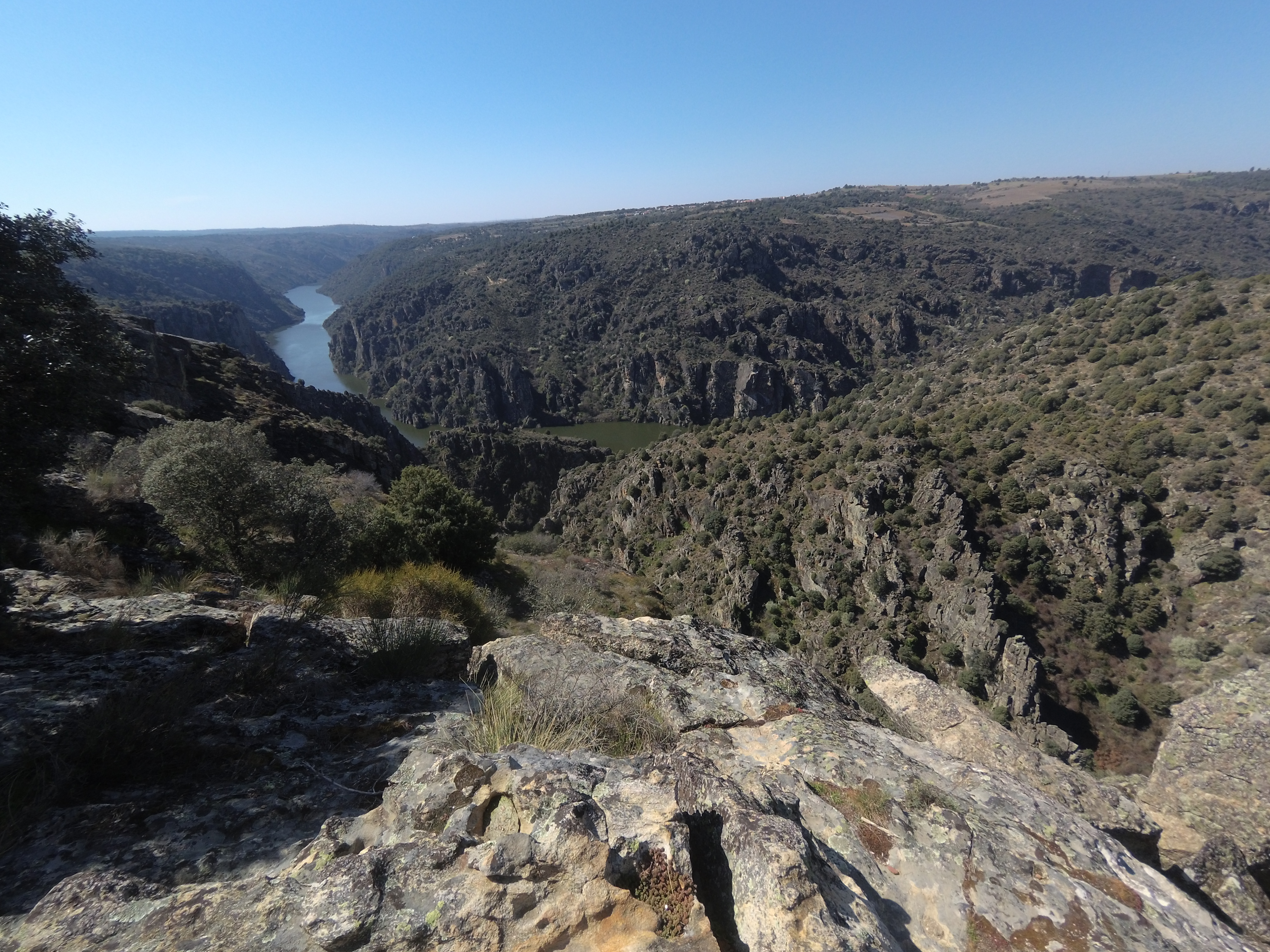 Arribes del Duero This is a photography of a Special Area of Conservation in Spain with the ID: ES4150096. Natura2000 entry, EEA entry